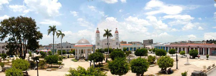 Al centro la Glorieta Morisca, símbolo de la ciudad.